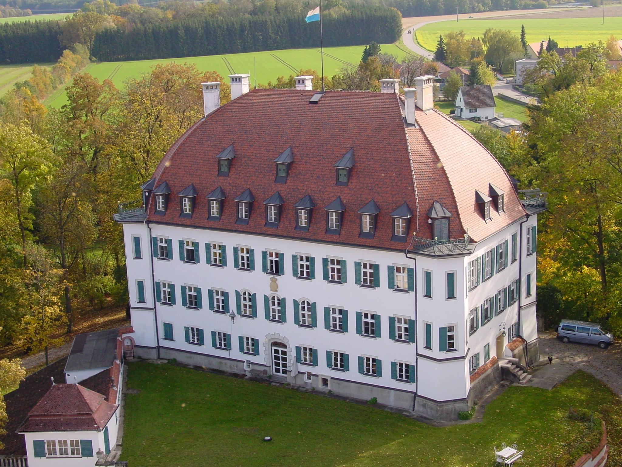 Mitten im Markt Waal liegt das Barockschloß des Fürsten von der Leyen und zu Hohengeroldseck